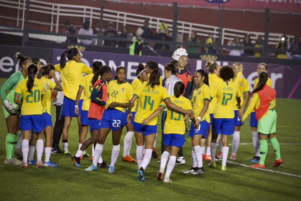 Selection feminine du Bresil lors d un tournoi international dispute a Sao Paolo